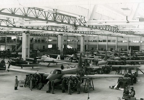 Fabrica Militar de Aviones (Airplanes' Military Plant). Cordoba. Argentina